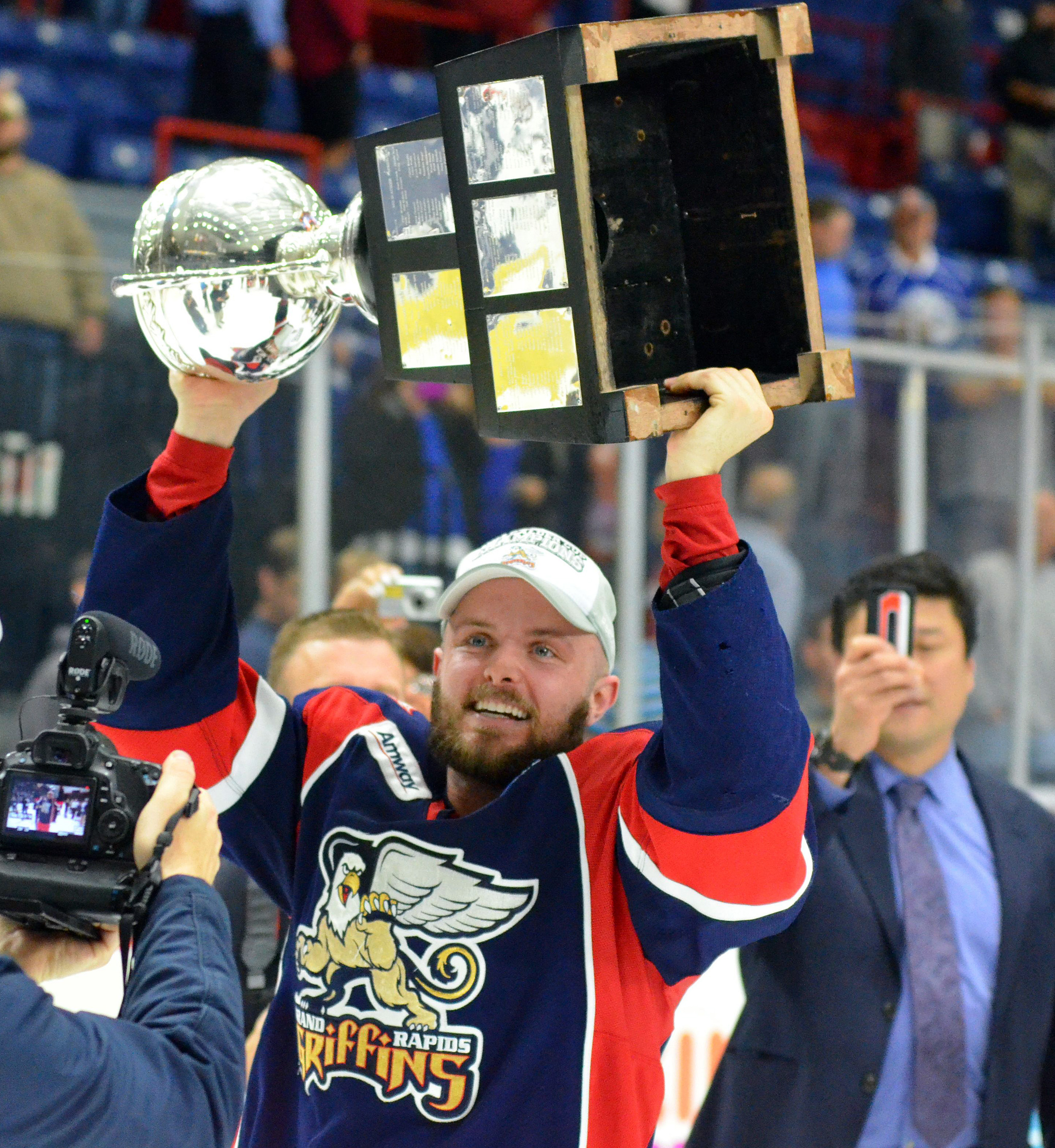 Photo: Dan Hickling/AHL